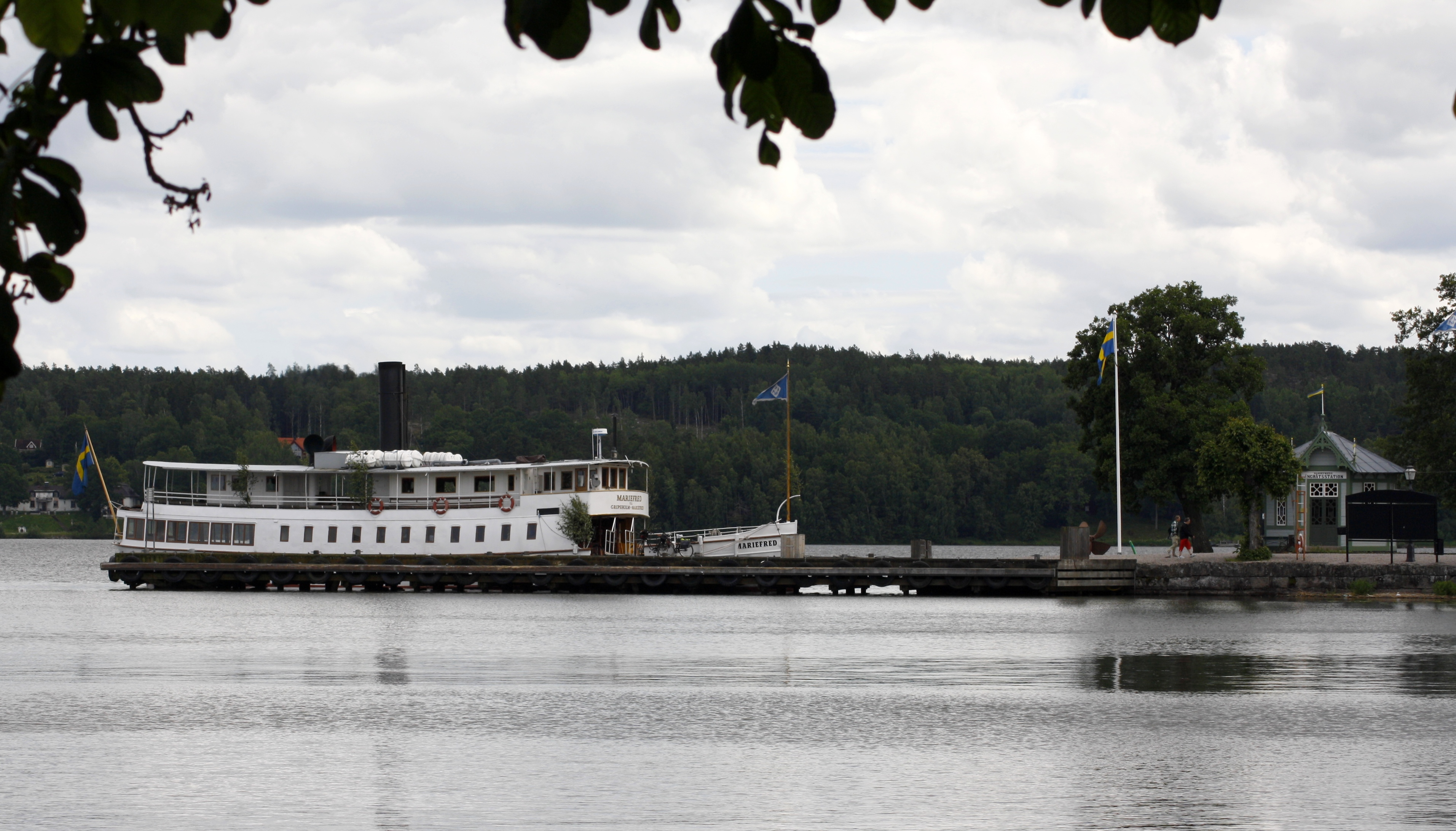 S/S Mariefred vid sin hemmahamn, ångbåtsbryggan i Mariefred